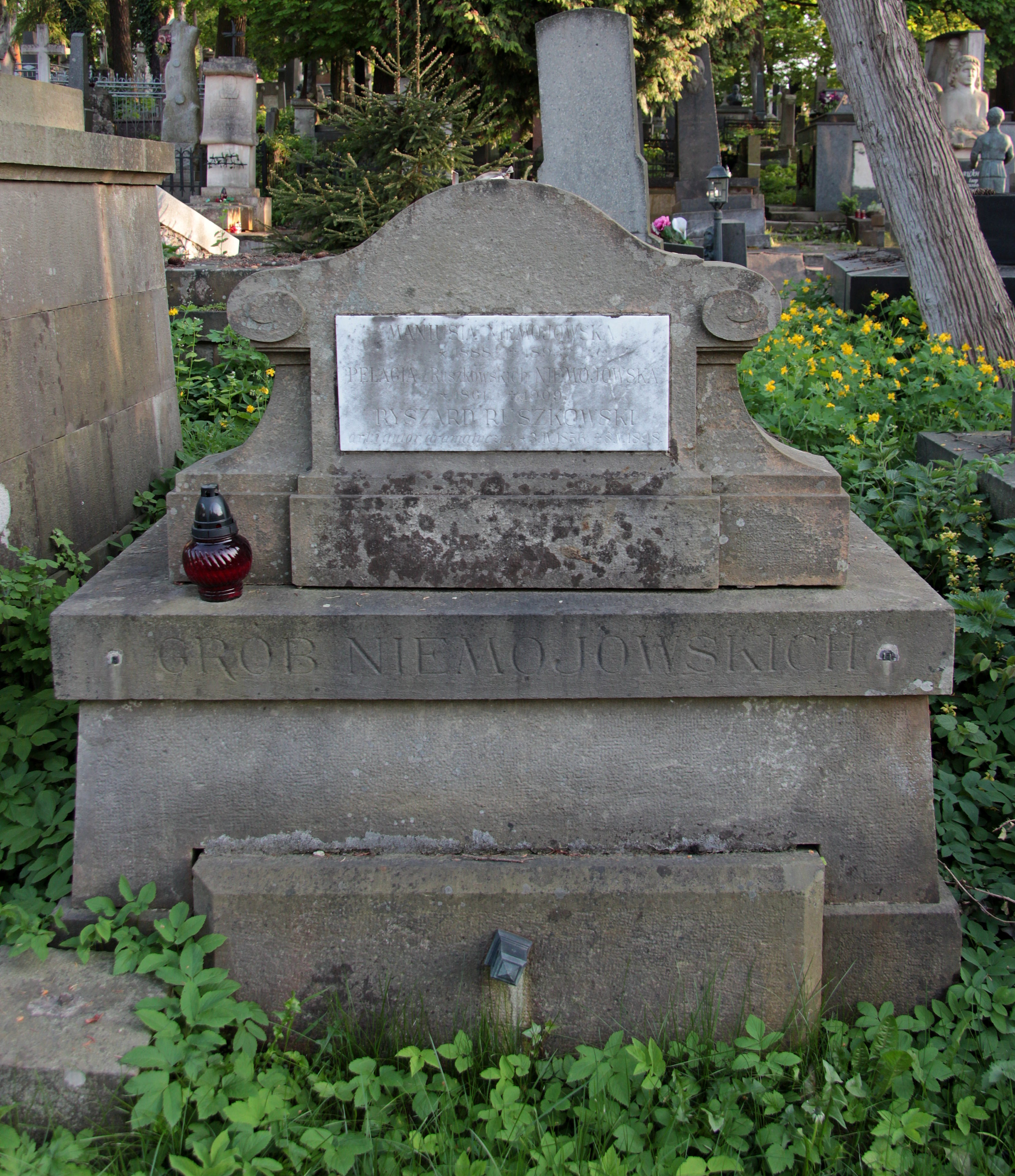 Гробівець родини Немойовських.Личаківський цвинтар.